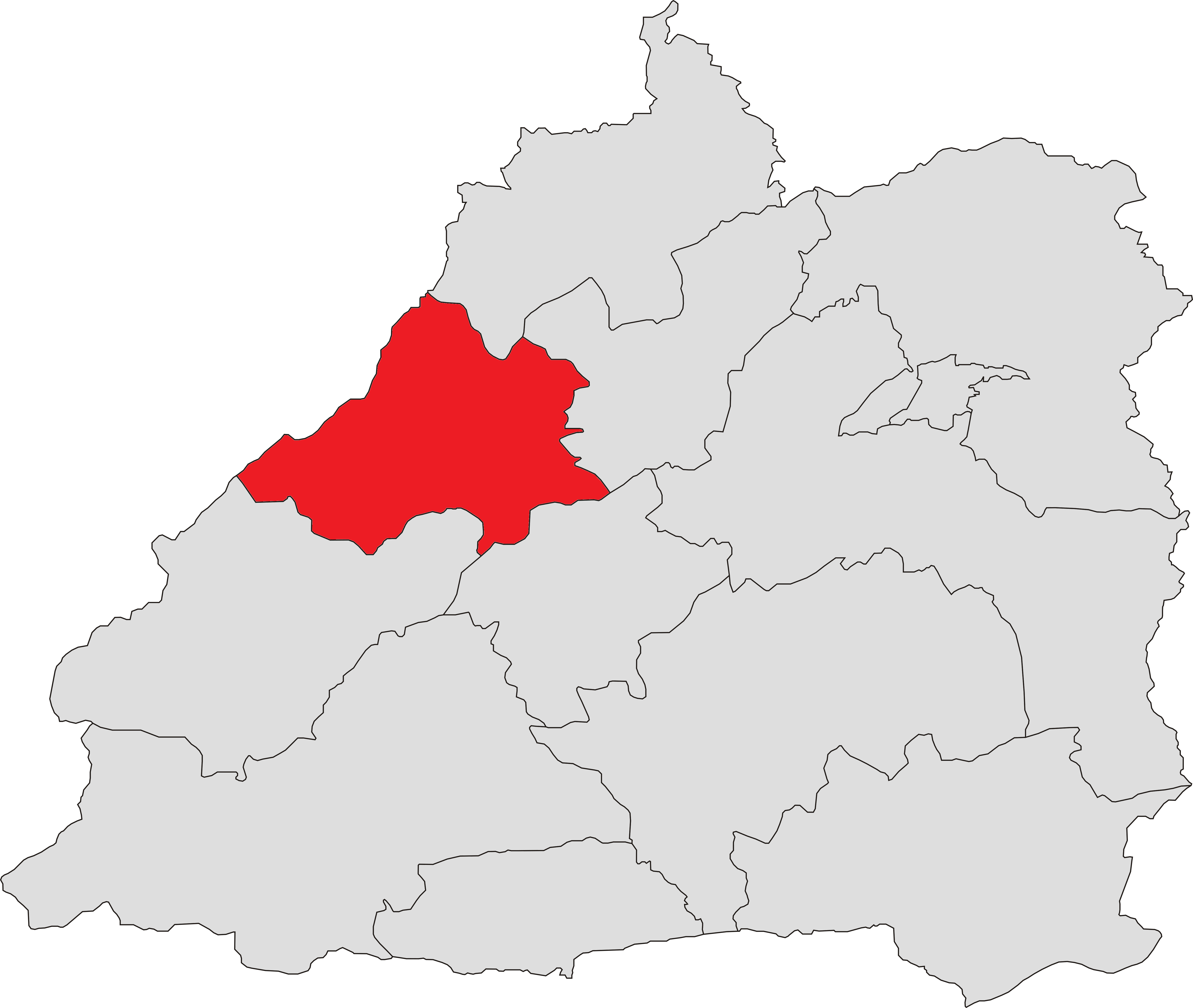 中文（中国大陆）: 芒市五岔路乡位置图